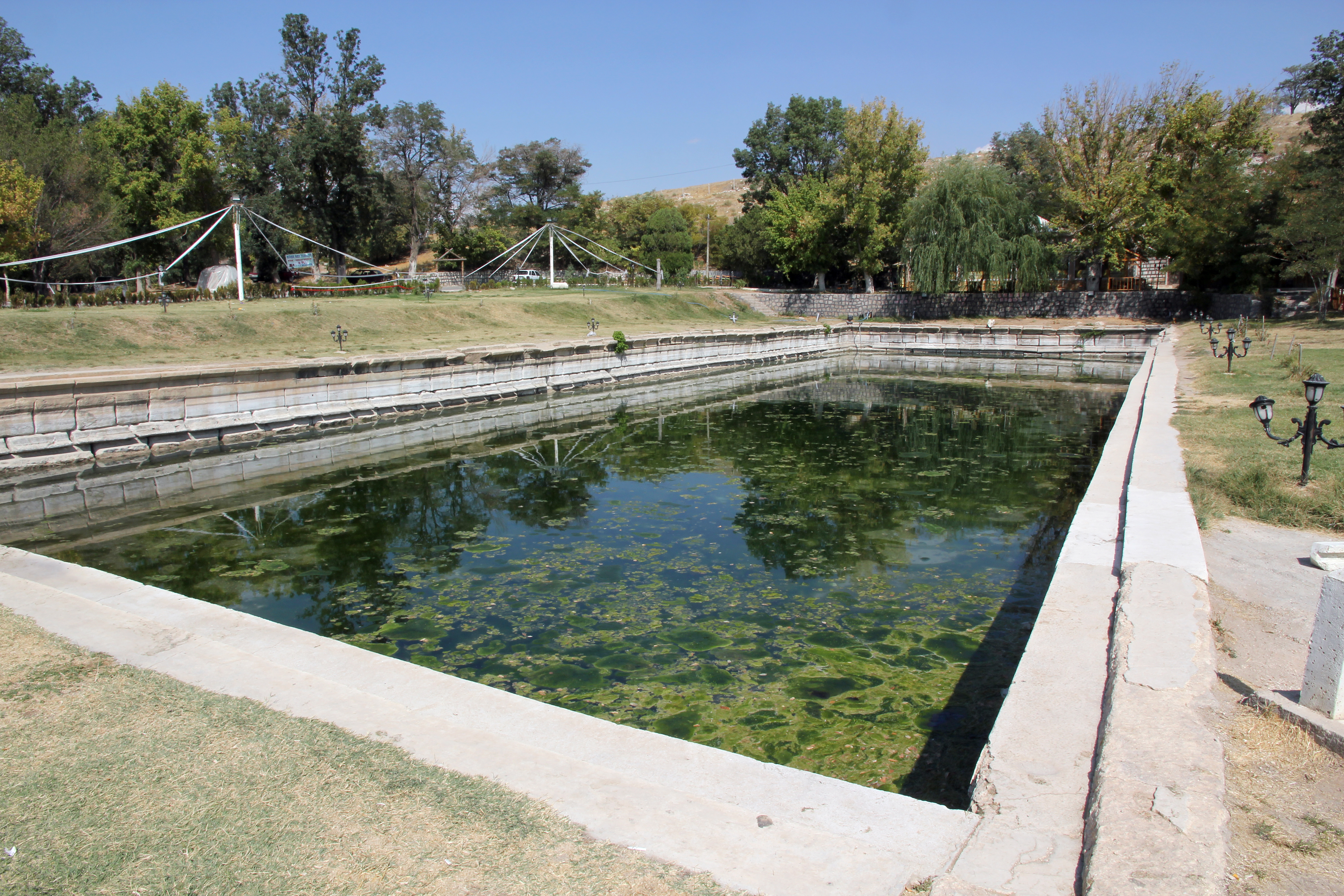 Tyana, römische Ruinen in Kemerhisar, Zentraltürkei, Reservoirbecken des Aquädukts